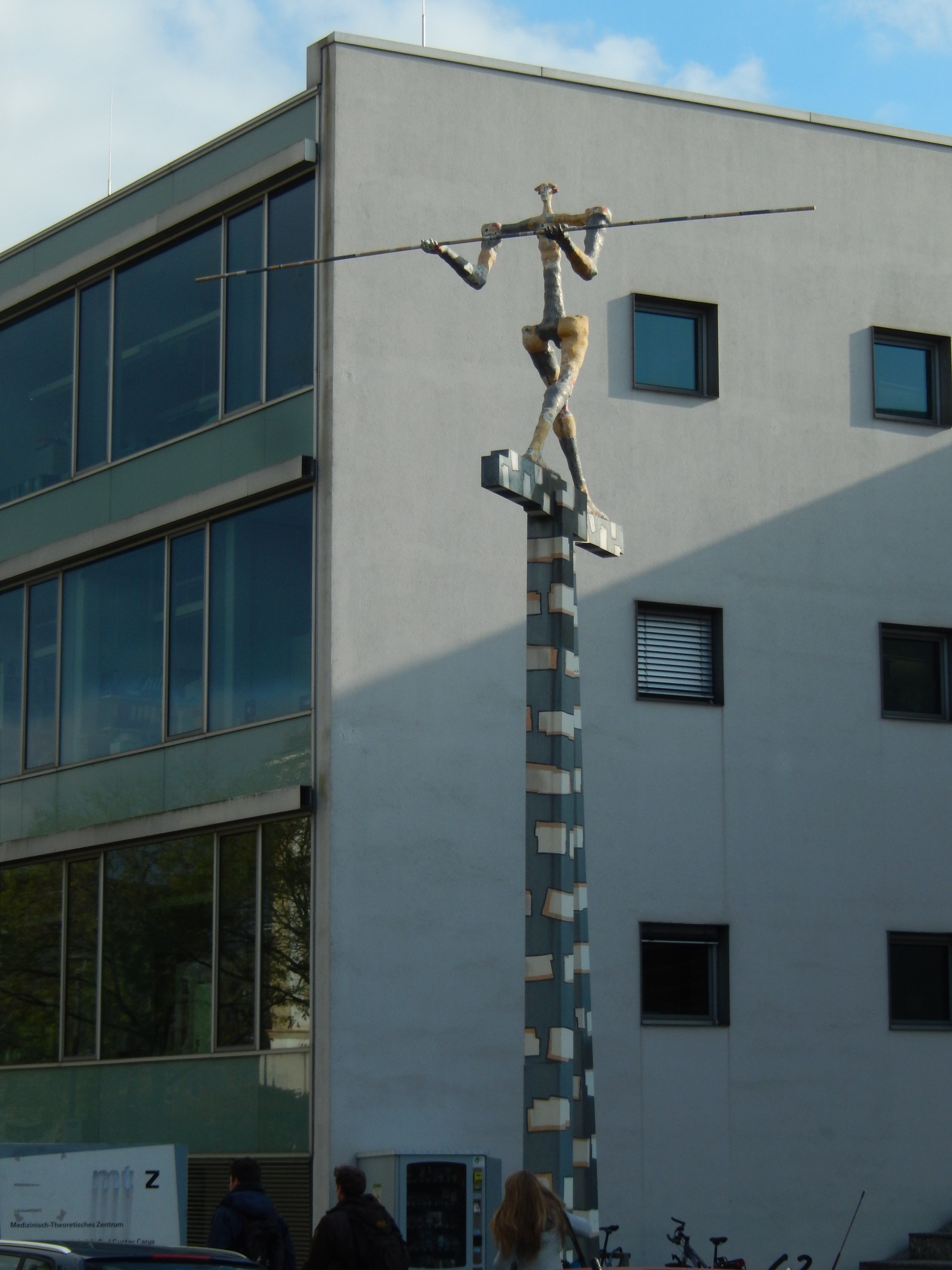 Dresden, Fiedlerstraße: Großplastik Balanceakt von Christoph Reichenbach aus Halle. Die Figur besteht aus Bleiverkleideten Polyesterharz auf beschichteten Stahlstützen und wurde im November 2009 an der Fiedlerstraße aufgestellt. Über den Köpfen der Wissenschaftler, Studierenden undPasanten symbolisiert die Plastik die in Dresden besonders engen Verbindungen zwischen der Grundlagenforschung und der Krankenversorgung: Fakultät und Universitätsklinikum Carl Gustav Carus haben sich über die Grenzen Deutschlands hinaus einen hervorragenden Ruf beim Überführen theoretischer Erkenntnisse in den praktischen klinischen Alltag erarbeitet – deshalb schreitet die Figur mit dem Balancierstab vom Medizinisch-Theoretischen Zentrum zu den Kliniken und Polikliniken des Uniklinikums.